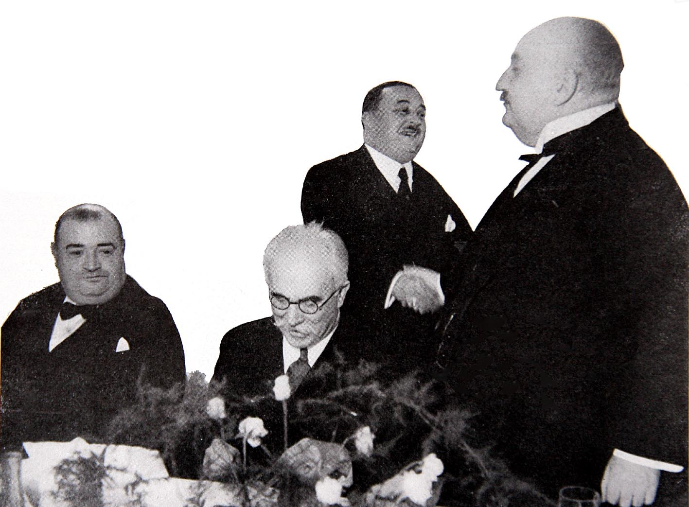 Curnonsky avec André Ronie et E. Pomiane nov 1932 Figaro illustré